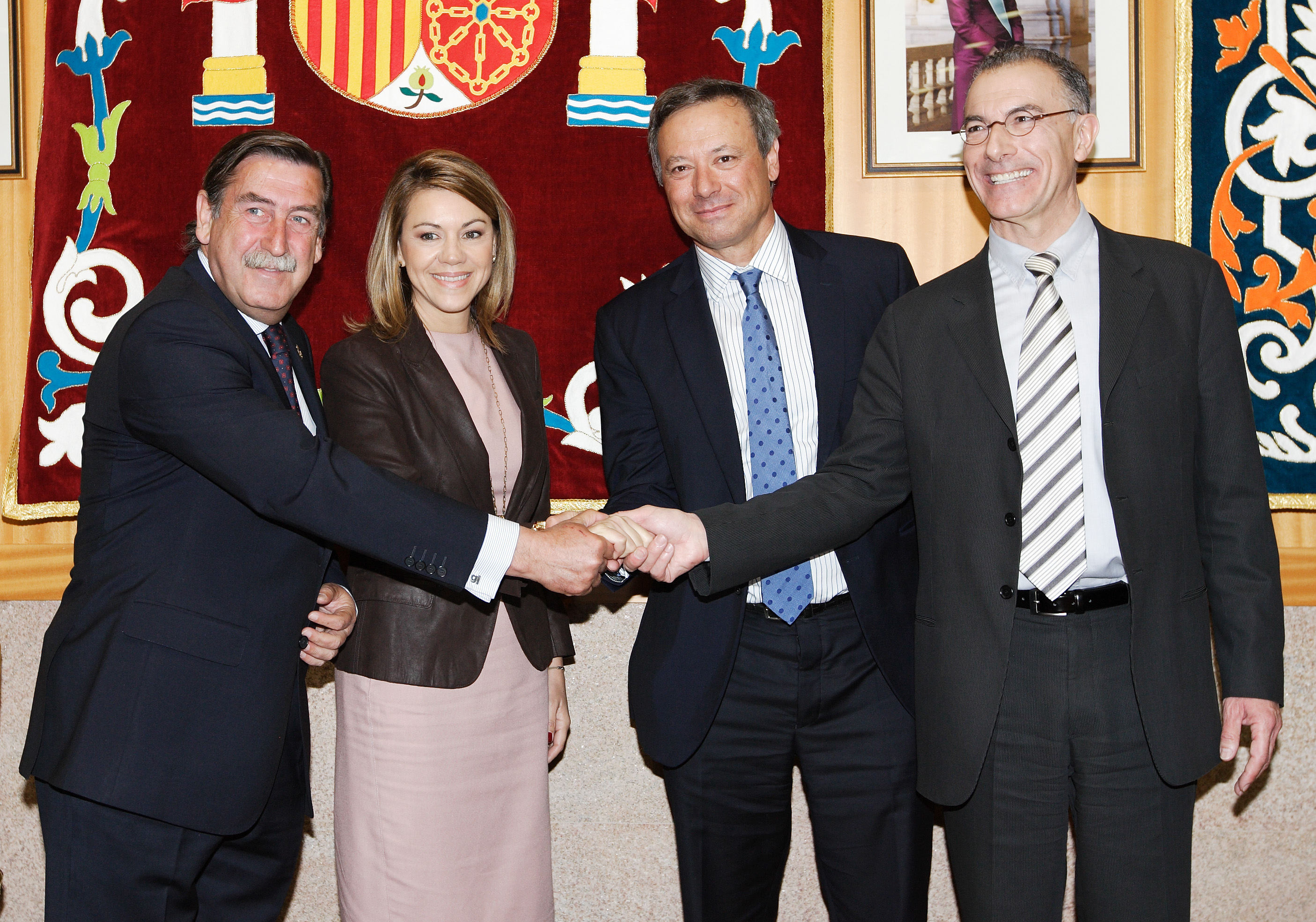 Talavela de la Reina (Toledo), 18-04-2012. - La presidenta de Castilla-La Mancha, María Dolores Cospedal, presidió en el Ayuntamiento de Talavera de la Reina, la firma de las escrituras de cesión de superficie del Ayuntamiento de Talavera a la empresa Senoble Ibérica S.L. para la construcción de una planta de productos lácteos.